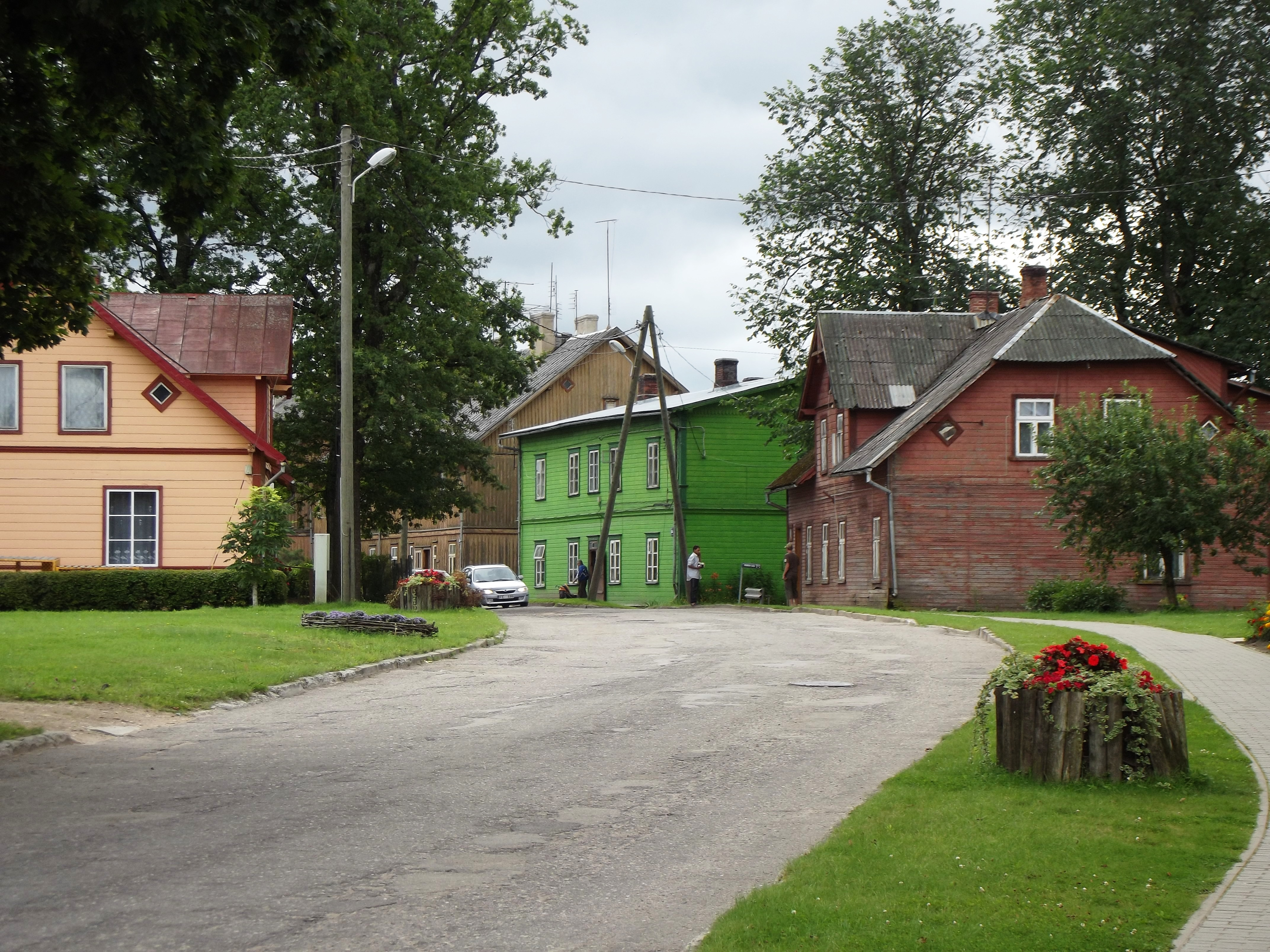 Staicele, Staiceles pilsēta, LV-4043, Latvia